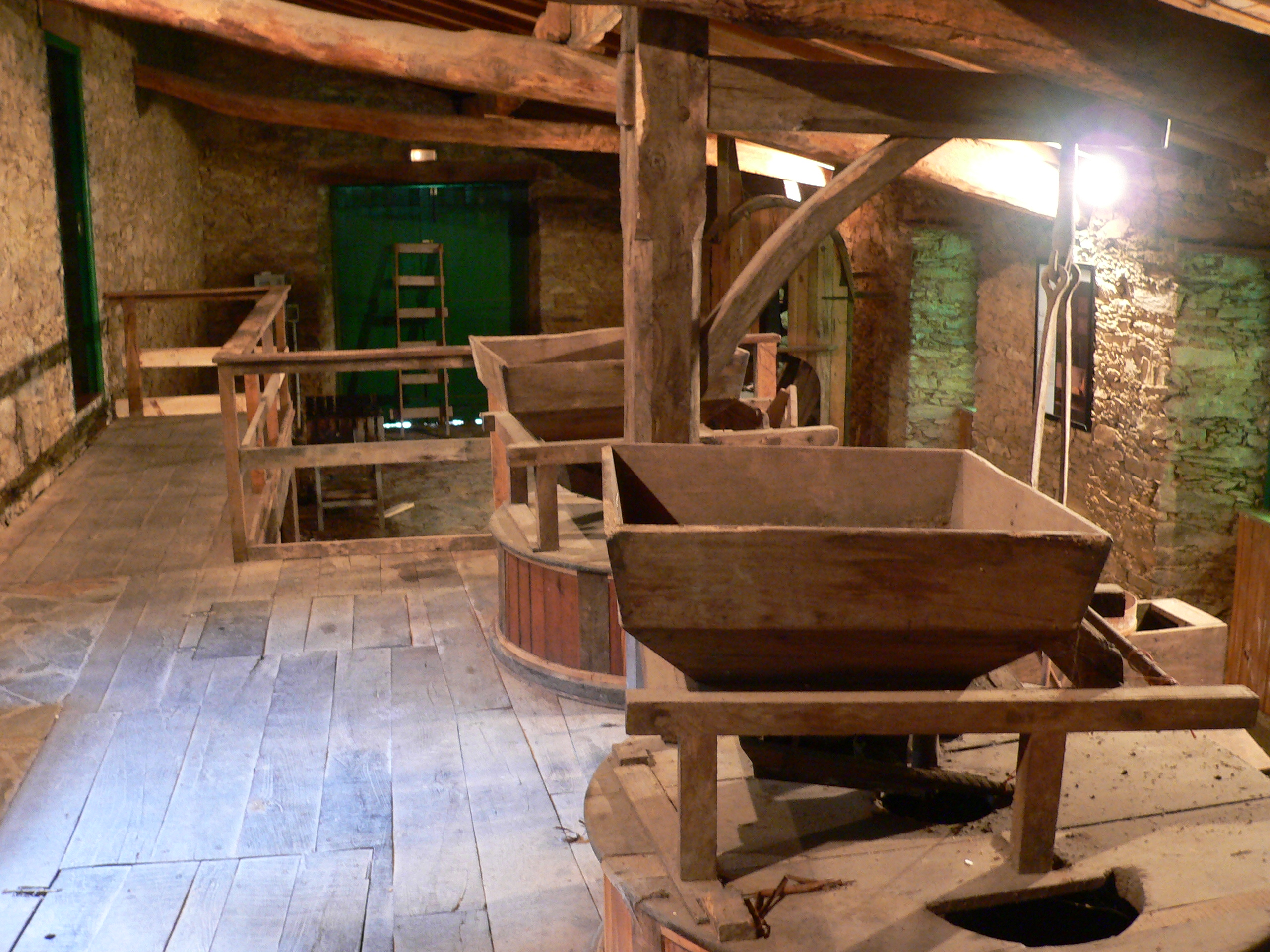 tolva